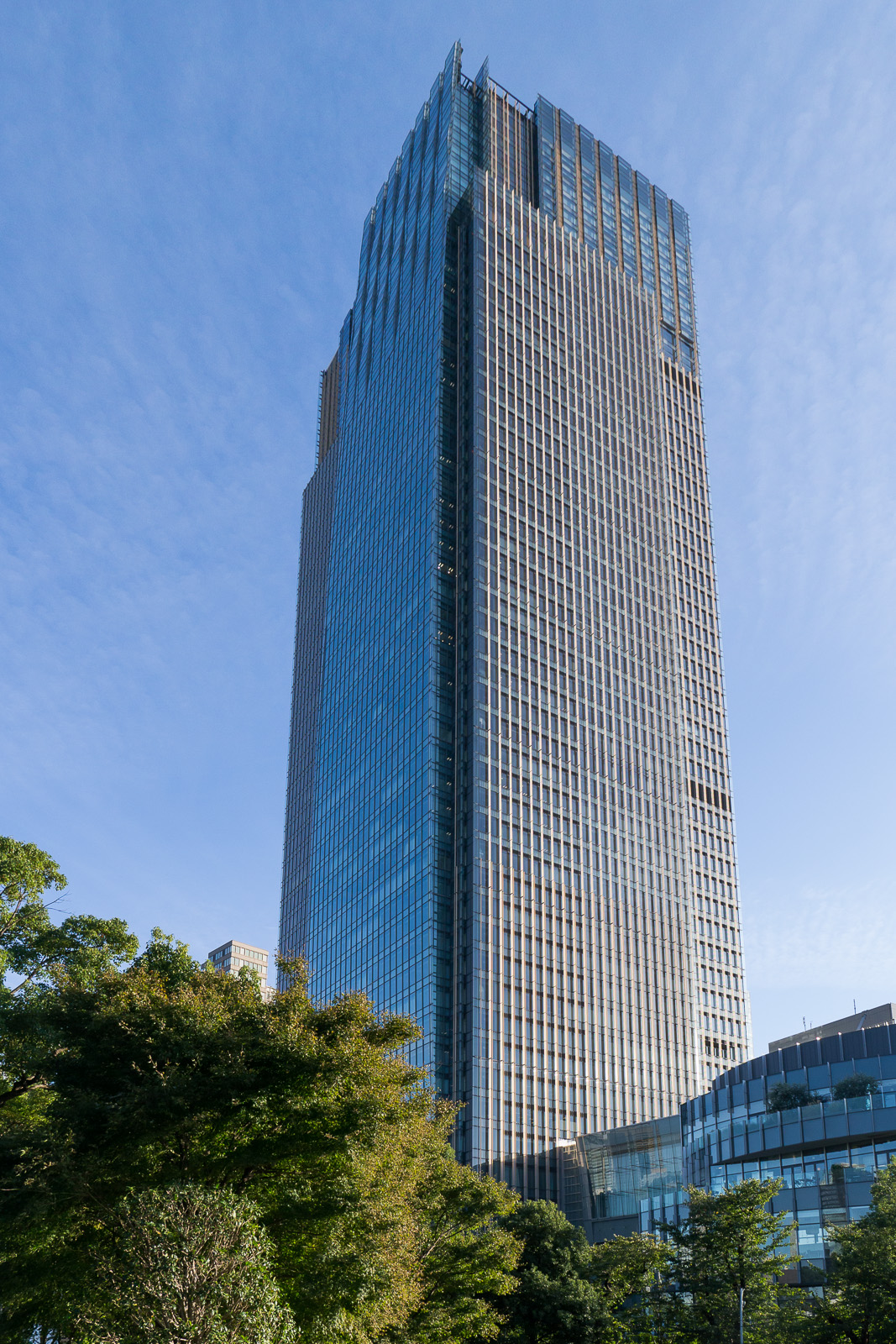 東京ミッドタウンタワー、東京都港区赤坂9丁目。